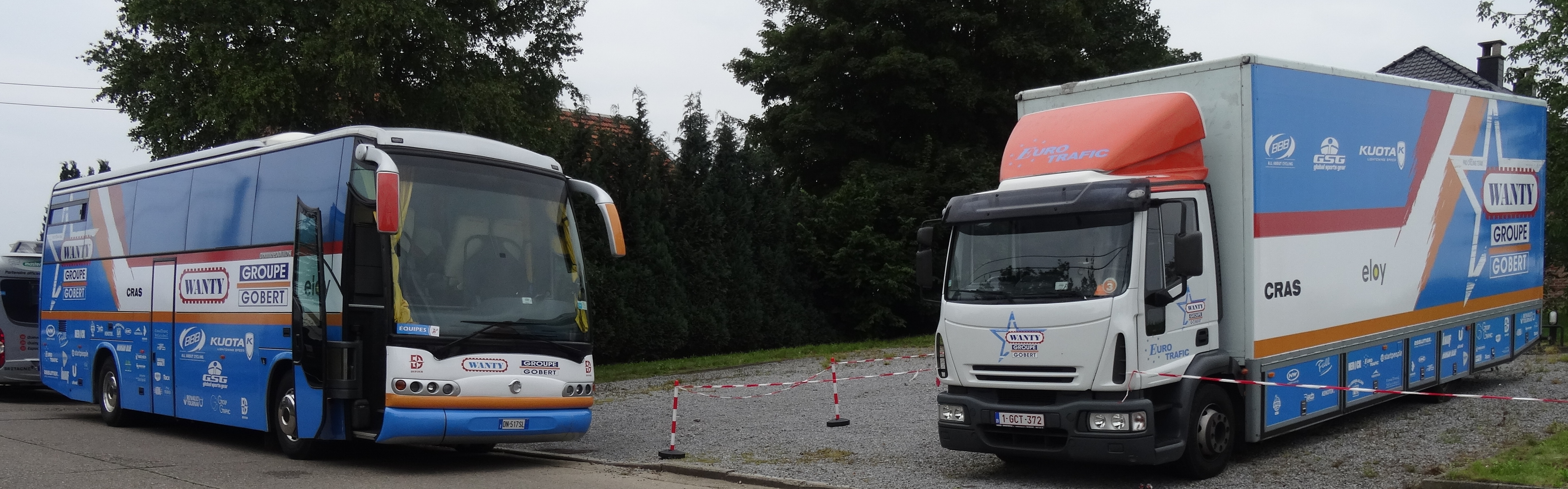 Reportage photographique réalisé le mercredi 30 juillet à l'occasion de l'arrivée de la cinquième et dernière étape du Tour de Wallonie 2014 à Alleur (Ans), Belgique.